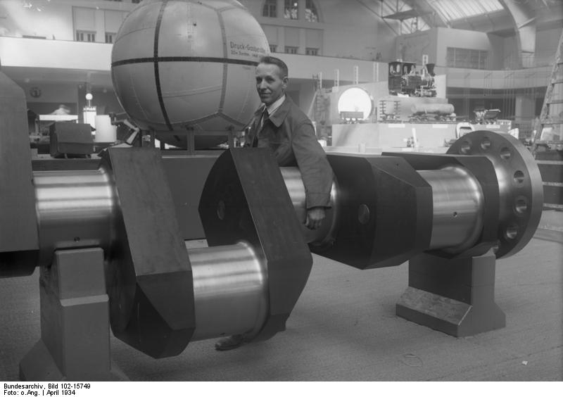 Die Eröffnung der großen Schau "Deutsches Volk-Deutsche Arbeit" am Kaiserdamm in Berlin! Teilansicht einer riesigen Kurbelwelle für Schiffsdieselmotoren auf der Schau. Die Kurbelwelle hat ein Gewicht von 400 Zentnern und ist für eine Leistung von 5000 PS. bestimmt.